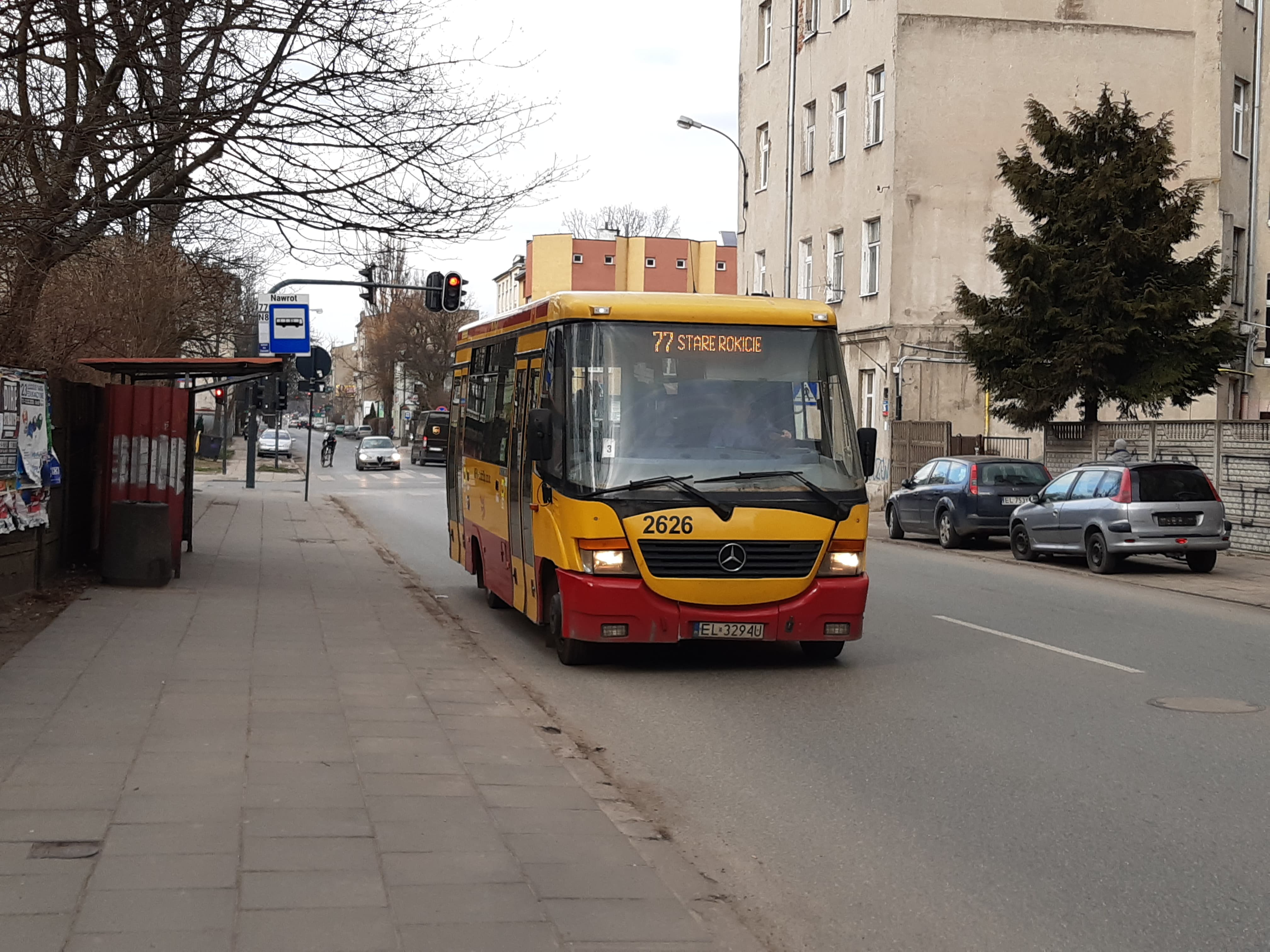 Autobus Jelcz M081MB #2626 jako linia 77 obsługuje przystanek Przędzalniana/Nawrot Jest z MPK - Łódź